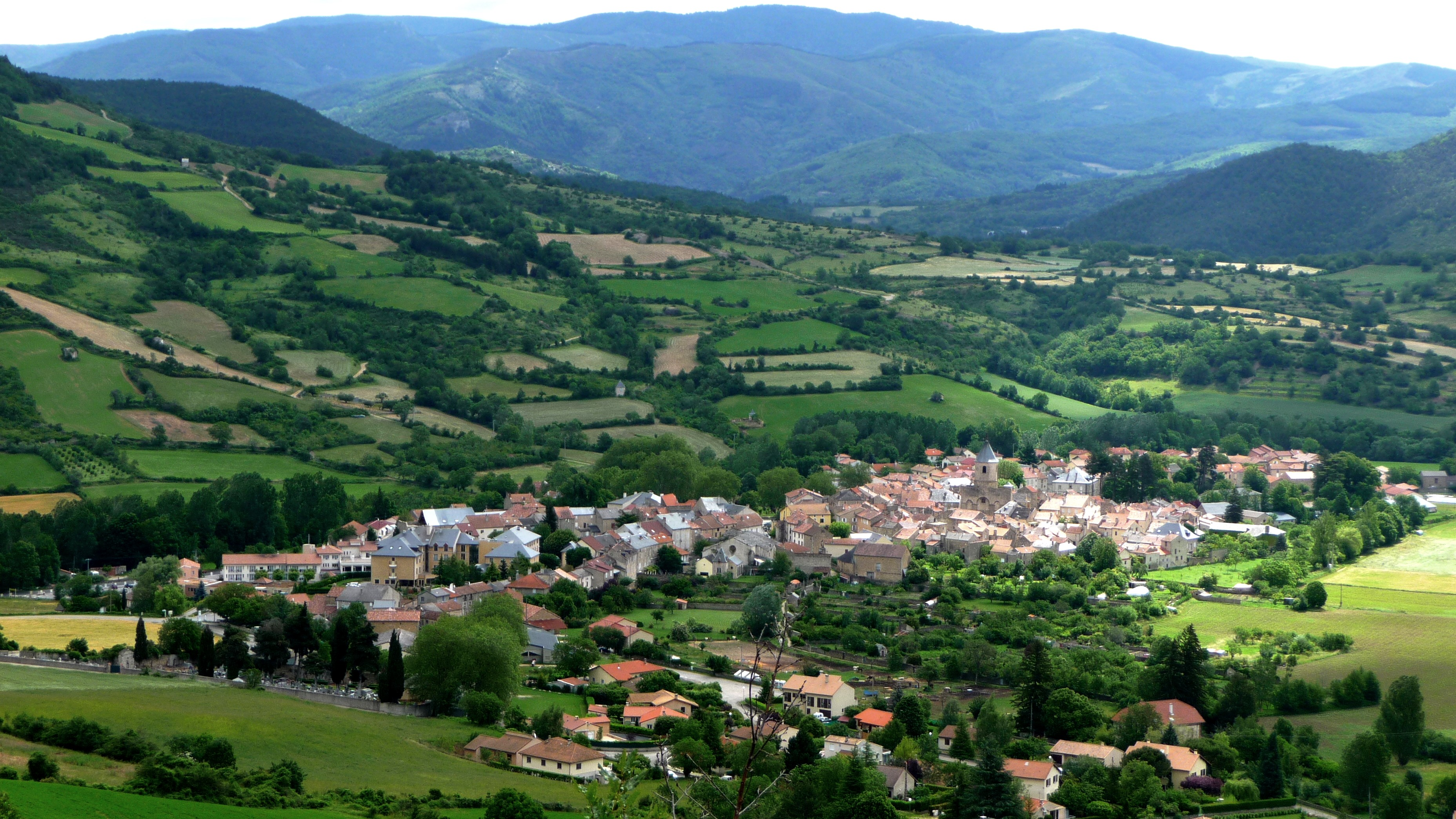 Campets autour du bourg de Nant (Aveyron, France).